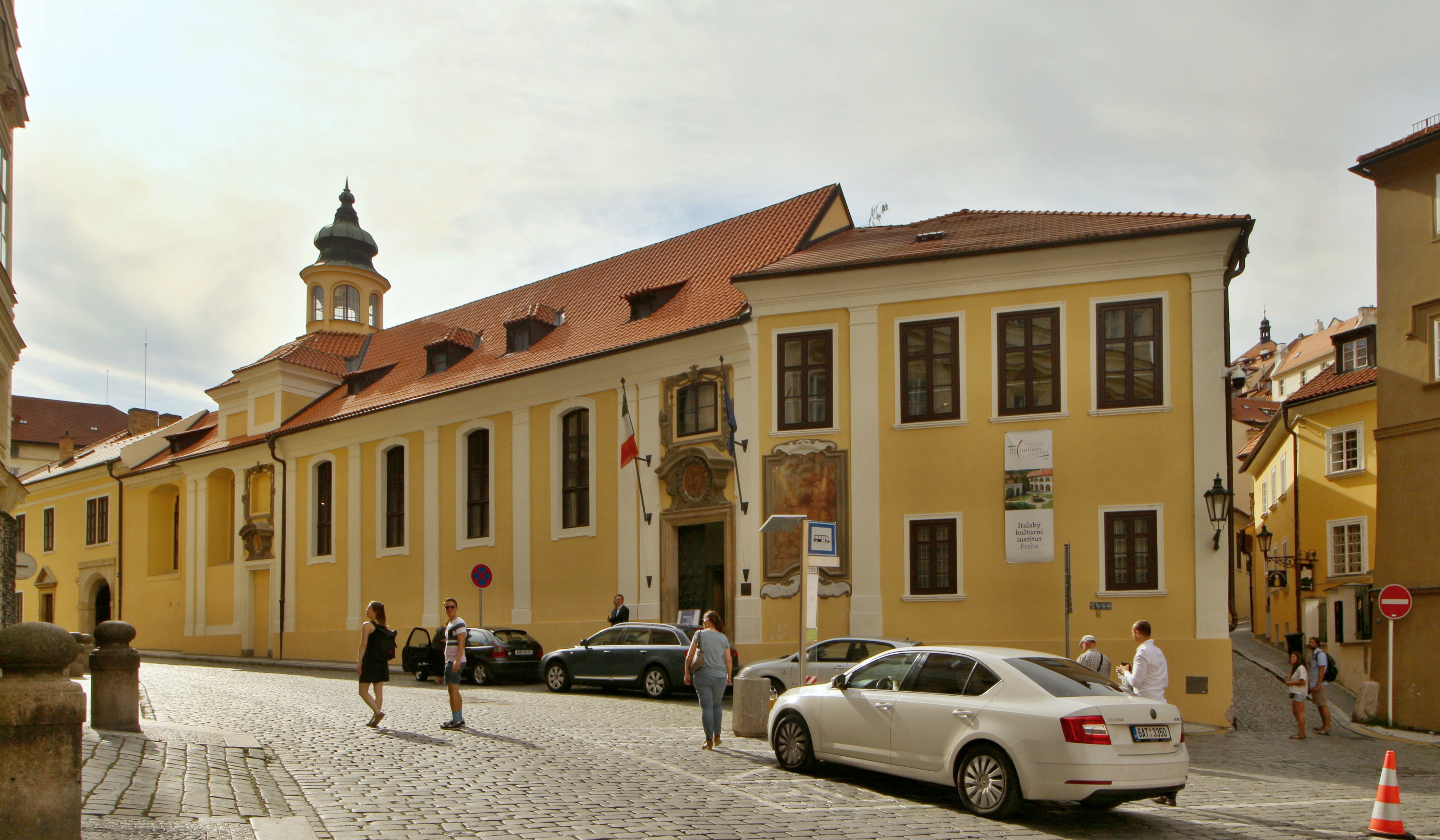 Malá Strana Vlašská ulice